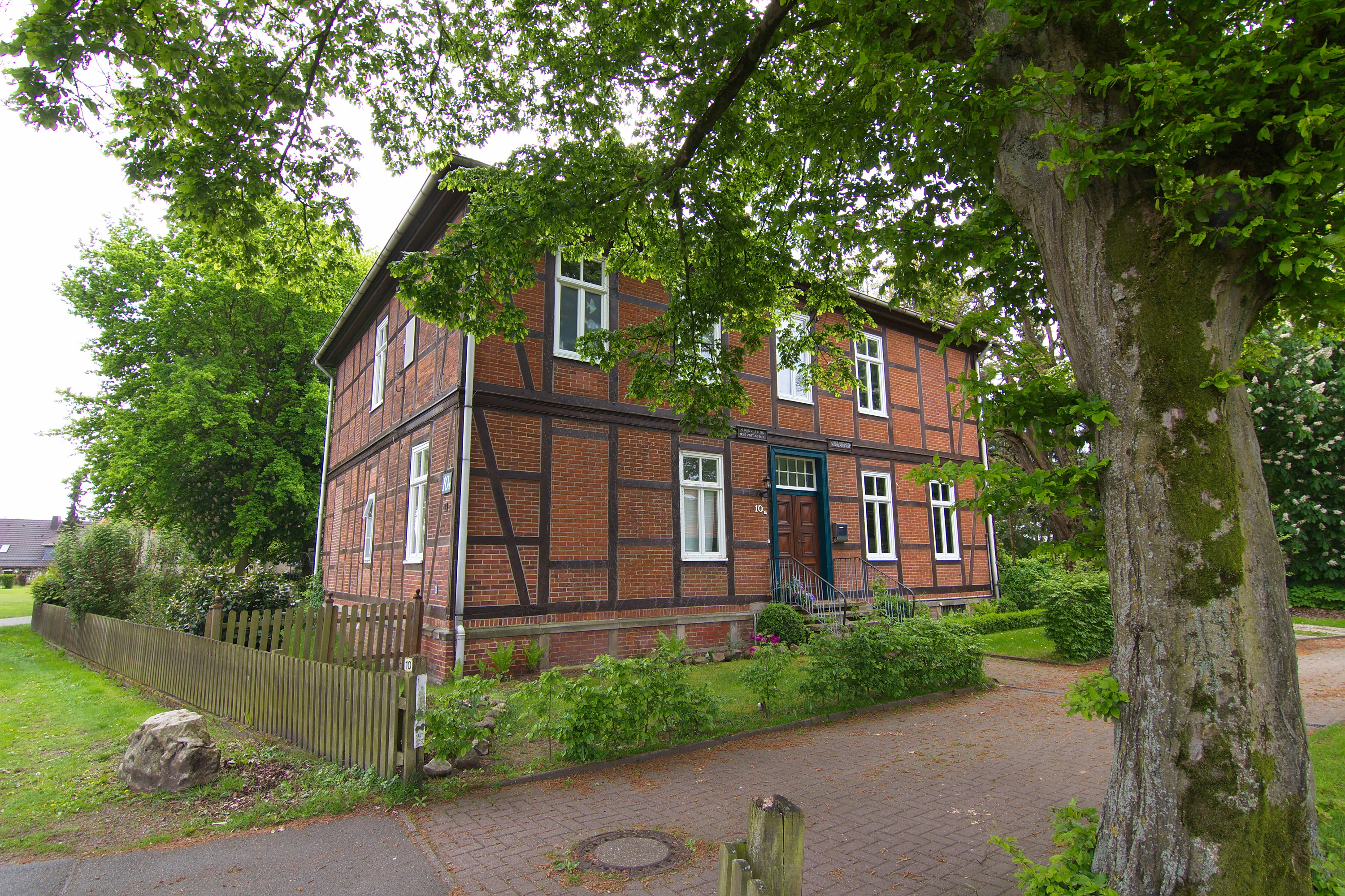 Pfarramt in Basse (Neustadt am Rübenberge), Niedersachsen, Deutschland.